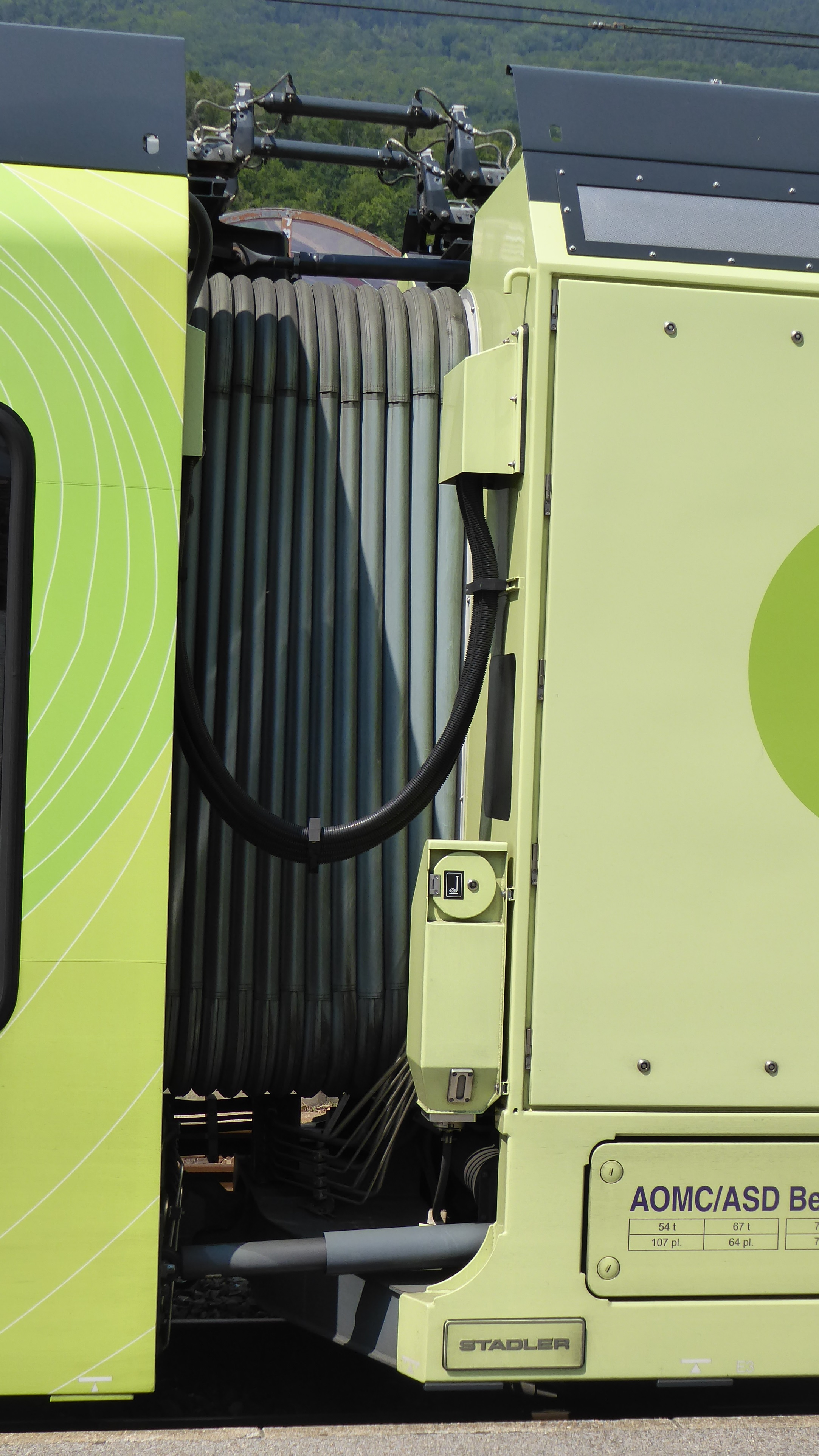 Stadler-GTW TPC Beh 2/6 541 Gelenk, aufgenommen in Monthey